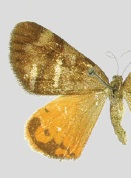 Hagnagora ignipennis